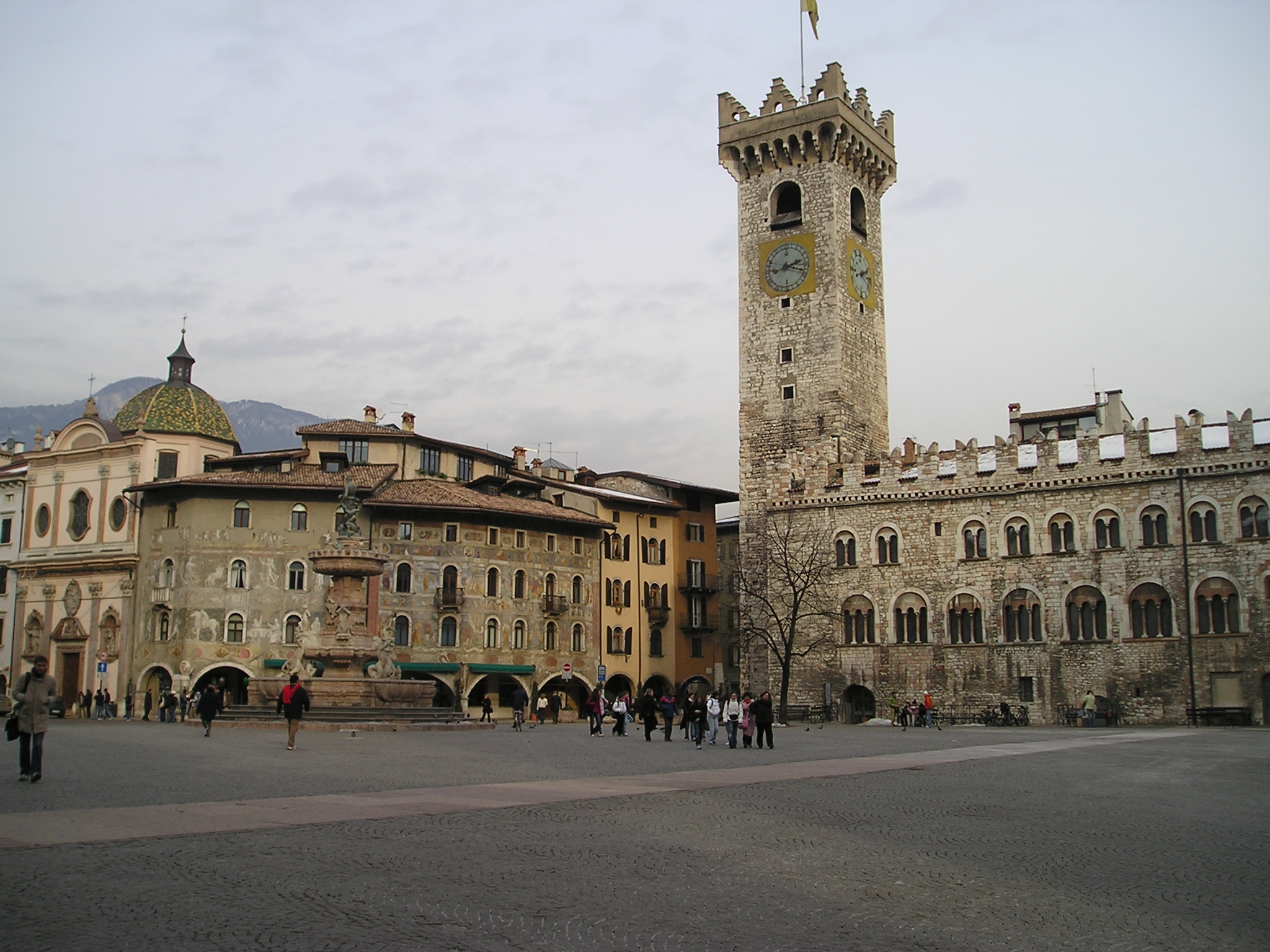 Panoramic view of Piazza Duomo, Trento.